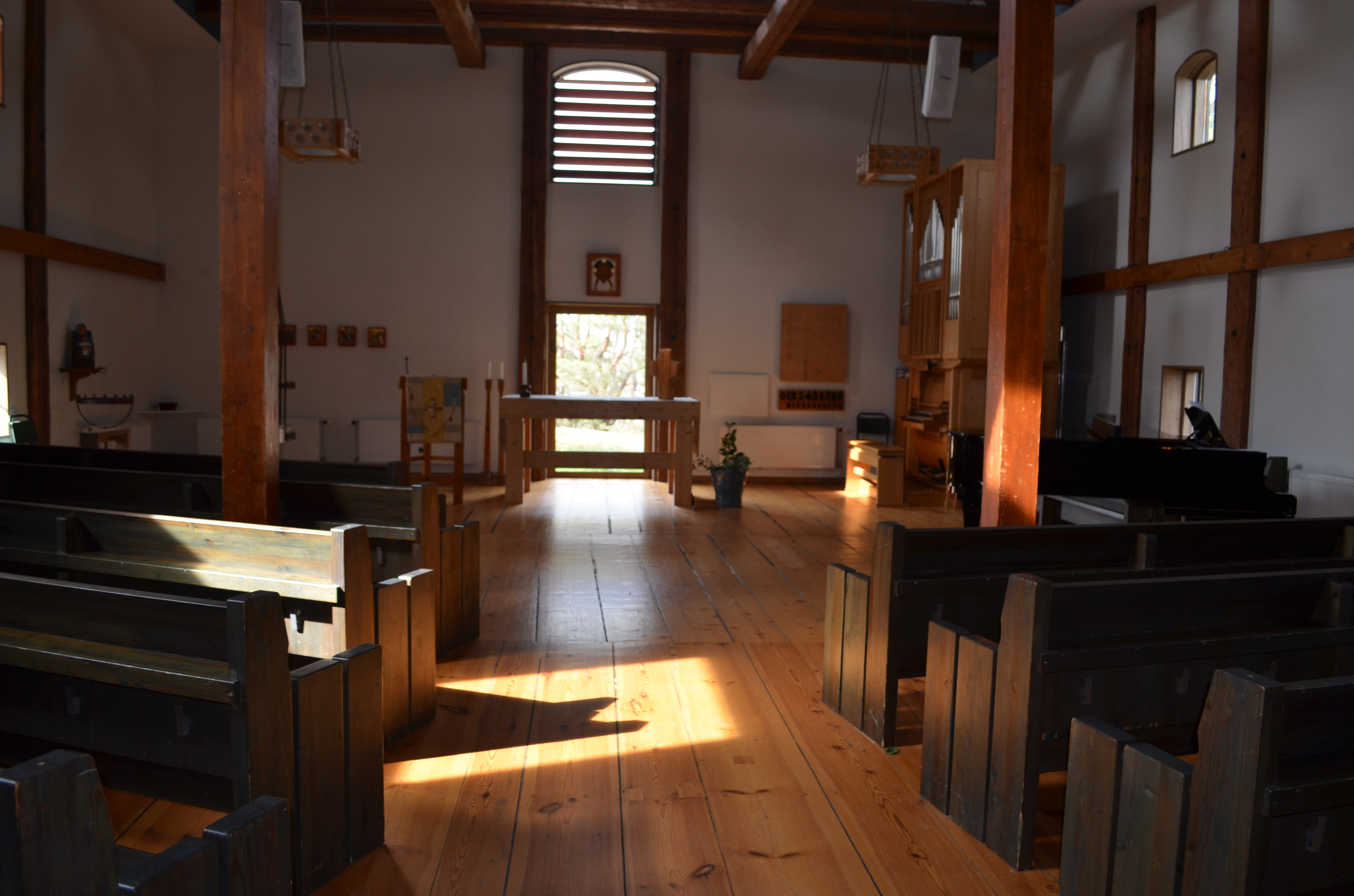 Kyrkorummet